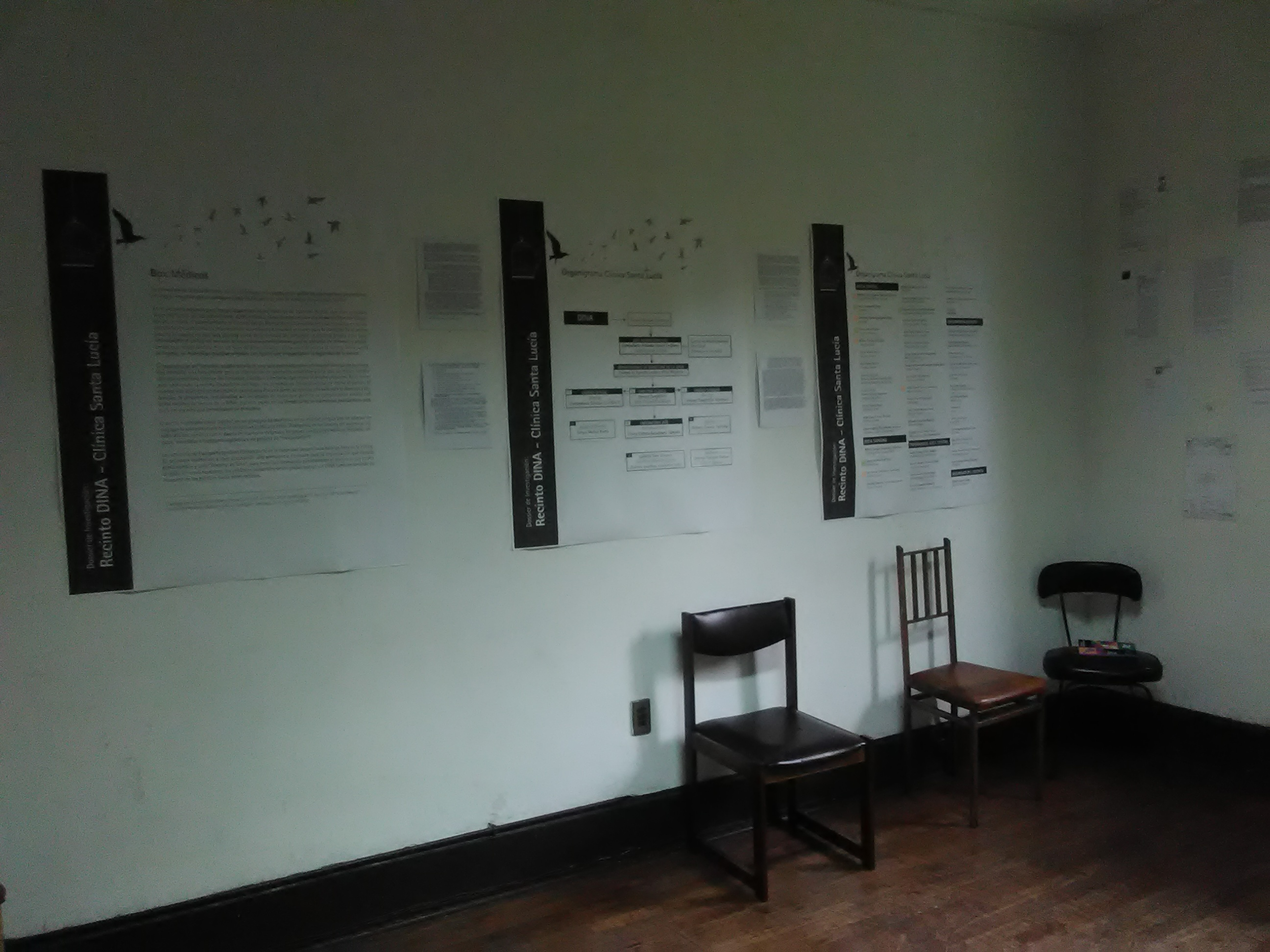 Ubicado en Santiago de Chile, frente al cerro del mismo nombre, fue usado como lugar de torturas y de desaparición de personas durante los primeros años del Régimen Militar.